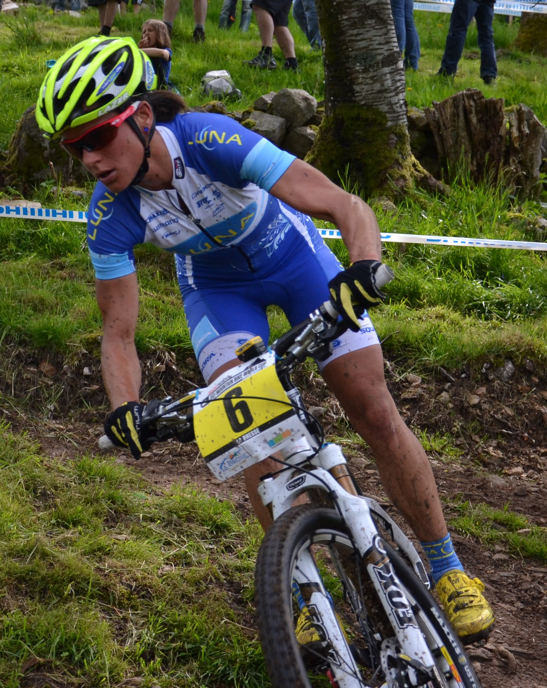 Katerina Nash lors de la 4e manche de la coupe du monde de VTT 2012 à La Bresse (FRA).